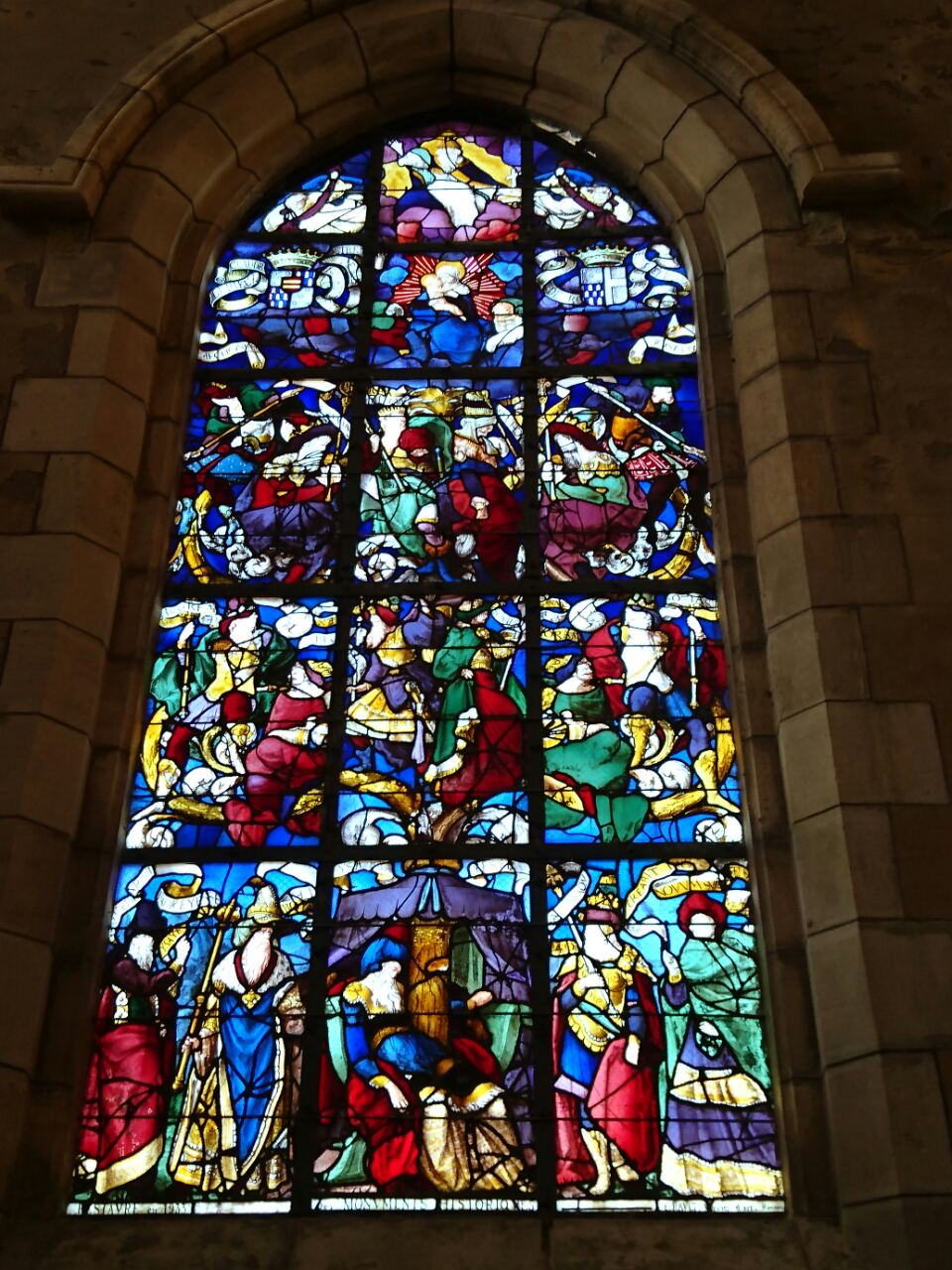 Vitrail de l'église Notre-Dame de Bongarant à Férel